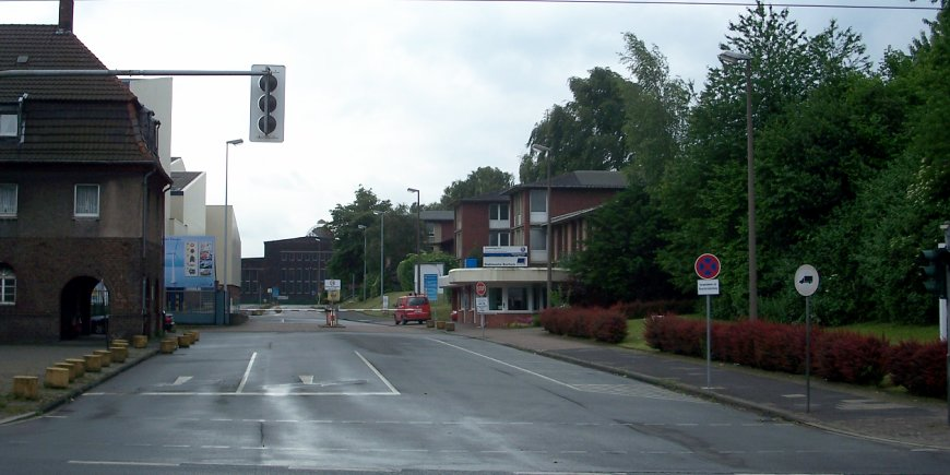 Zufahrt zu ThyssenKrupp Steel Elektro und Stahlwerke Bochum an der Castroper Str. 228 in Bochum